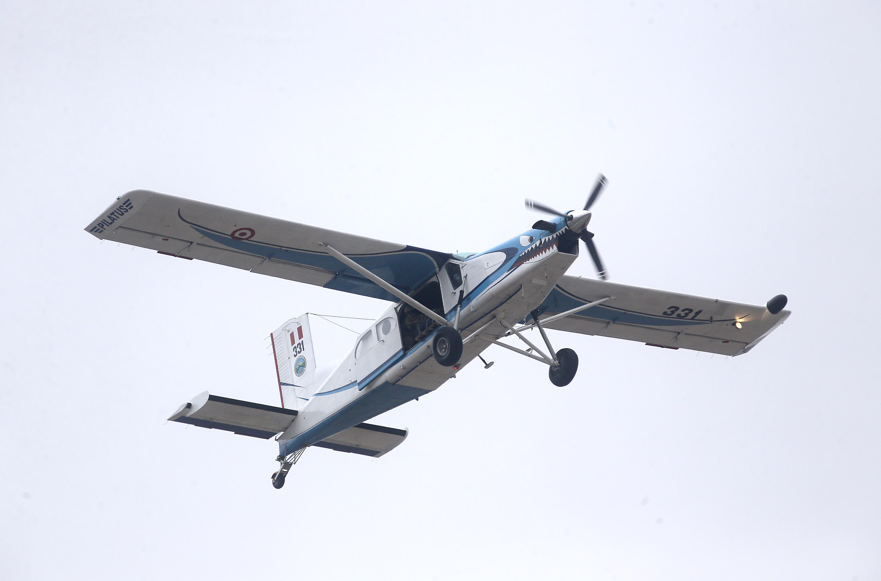 El ministro de Defensa Pedro Cateriano, acompañó al presidente Ollanta Humala en la ceremonia de graduación de cadetes y clausura del año académico de la Escuela de Oficiales de la Fuerza Aérea del Perú, en la Base Aérea de Las Palmas.